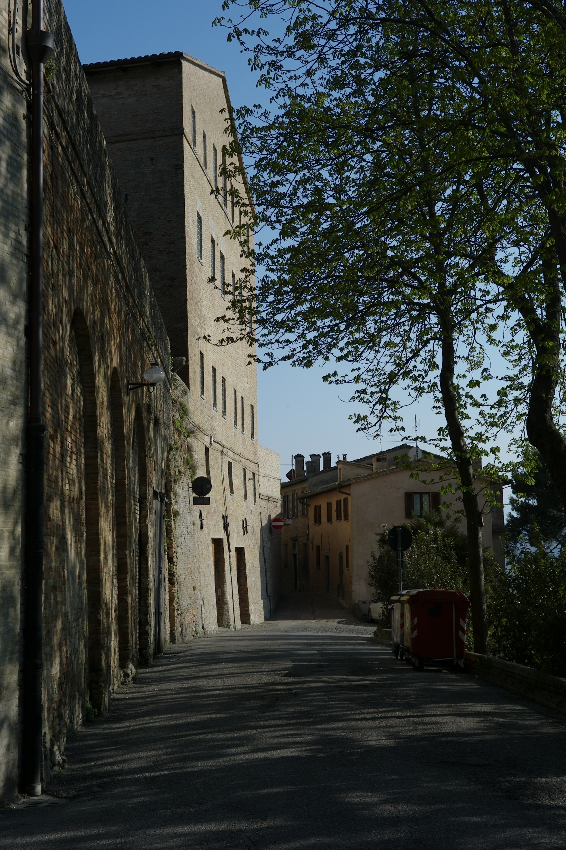 A sinistra, l'alta facciata occidentale del Monastero di Santa Caterina ad Urbino